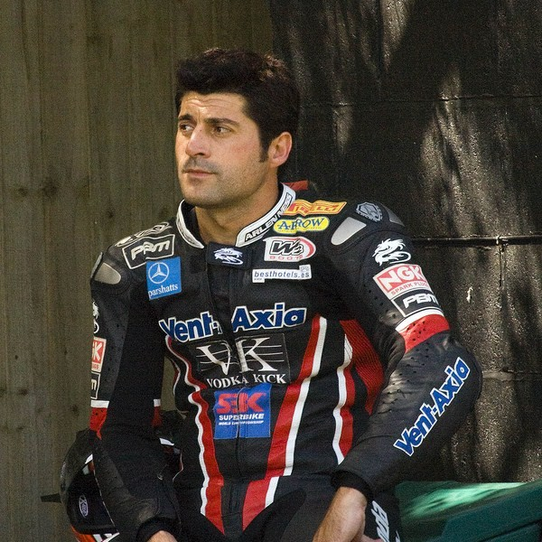 Gregorio Lavilla a Brands Hatch mondiale Superbike